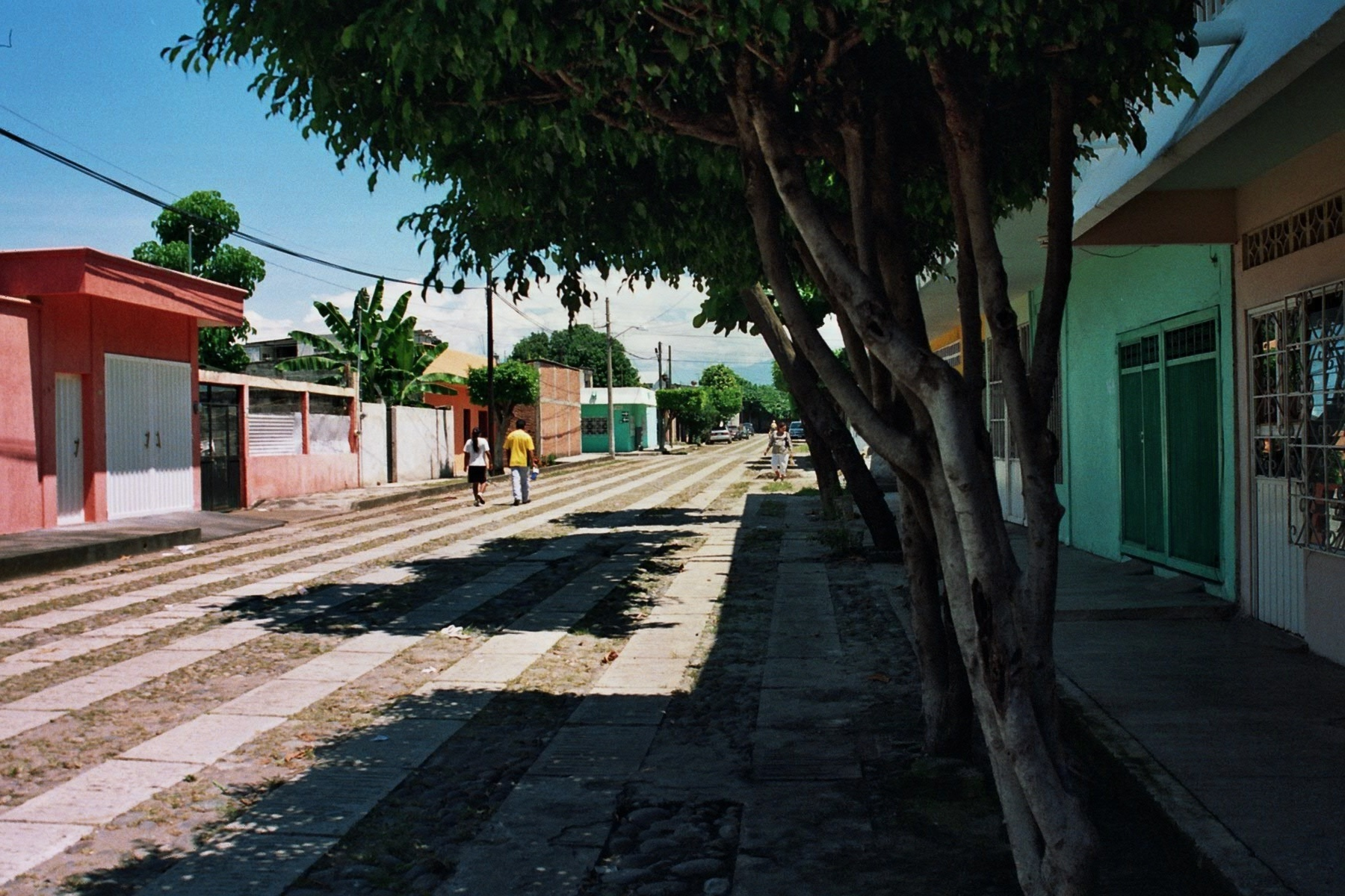 Die "13 pvd sur", eine kleine Seitenstraße im Süden der Stadt Tapachula, Chiapas